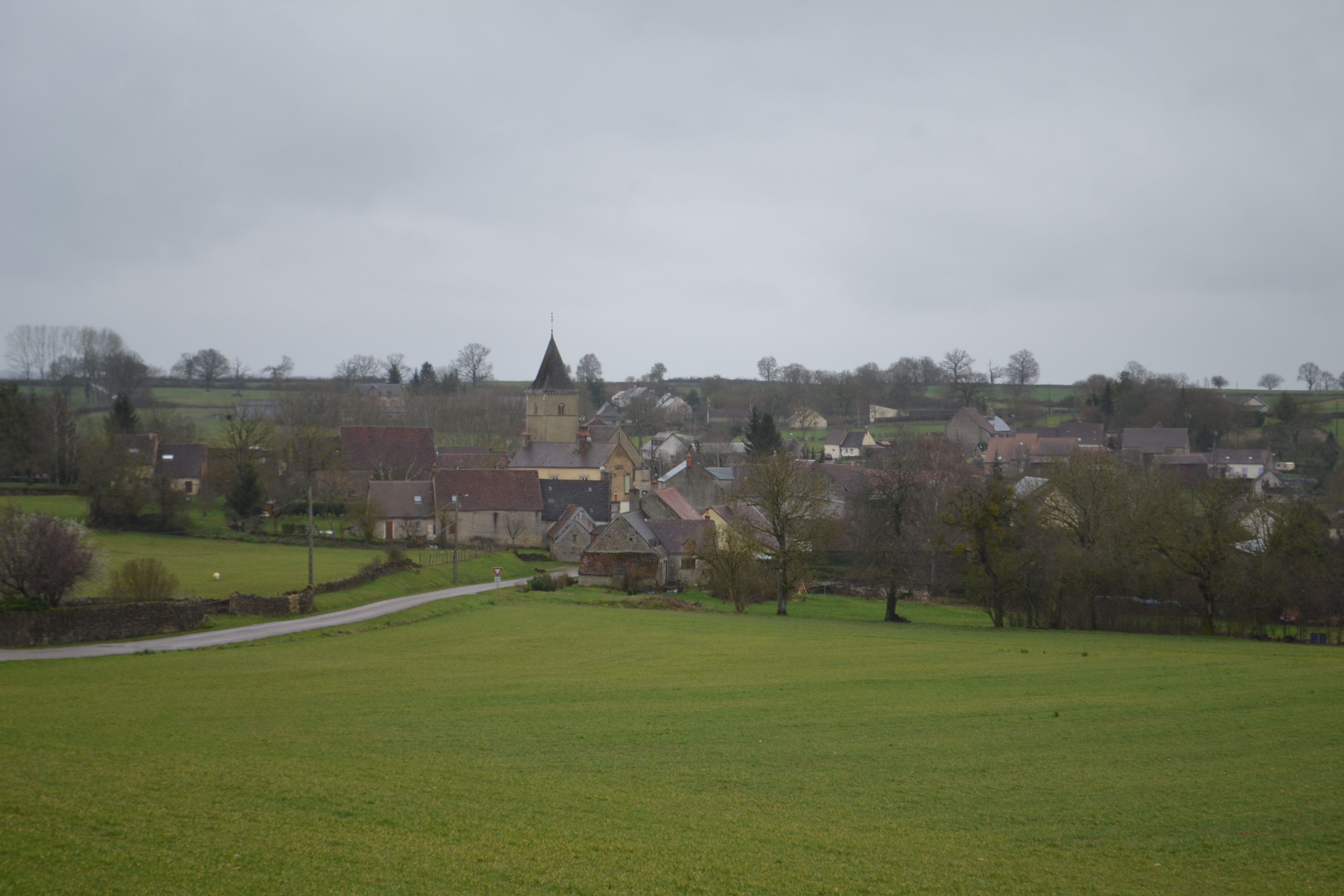 Oulon (Nièvre) : vue d'ensemble.